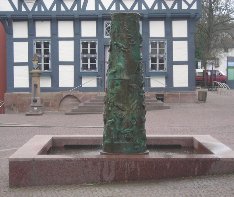 Spenneweih-Brunnen von Siegfried Neuenhausen vor dem historischen Rathaus am Rand der Fußgangerzone (Ecke Kurze Straße/Lange Straße) in Uslar.